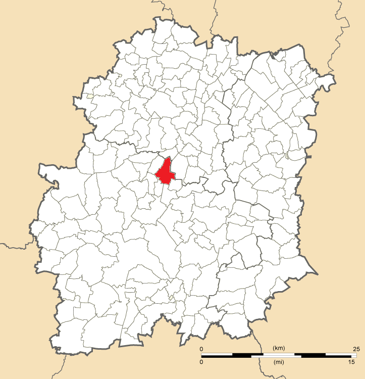 Carte de position de Boissy-sous-Saint-Yon en Essonne (91)